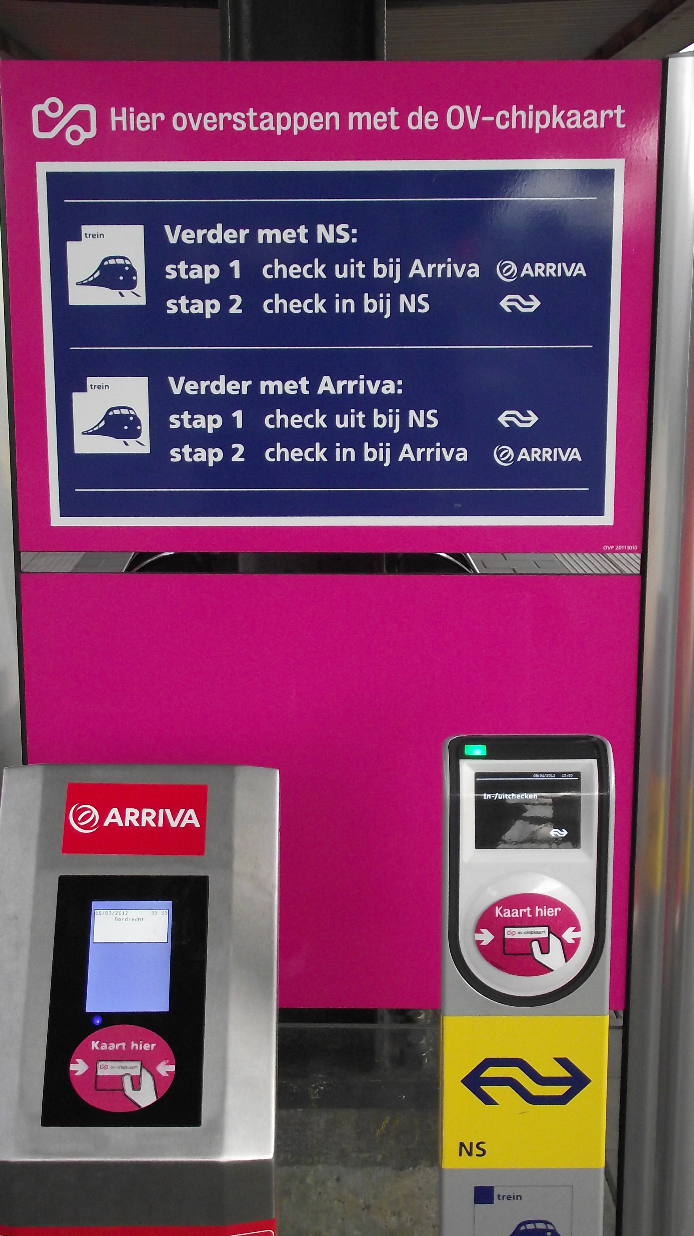 Arriva en NS OV-chiplezers naast elkaar